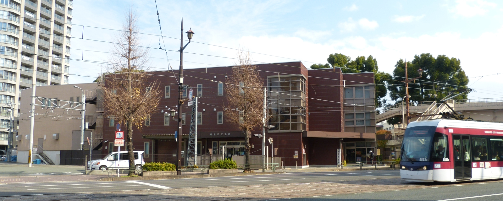 熊本市交通局（大江庁舎）と0802形(0802AB)